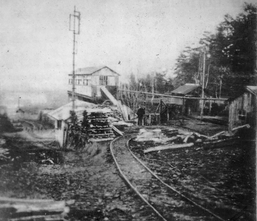 La descenderie Bathiard en activité, un charbonnage de la concession de Veuvrotte (Houillères d’Épinac).